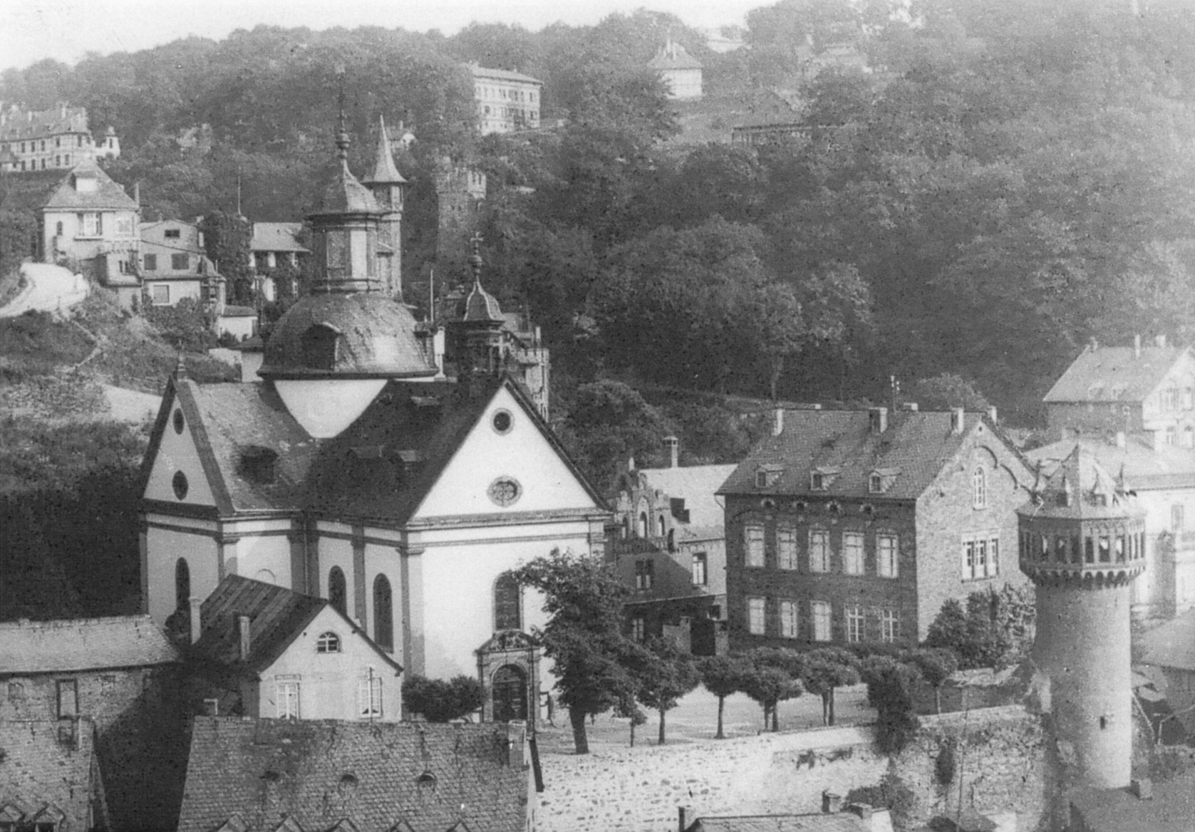 Die alte Heilig-Kreuz-Kirche in Koblenz, rechts der Heribertsturm